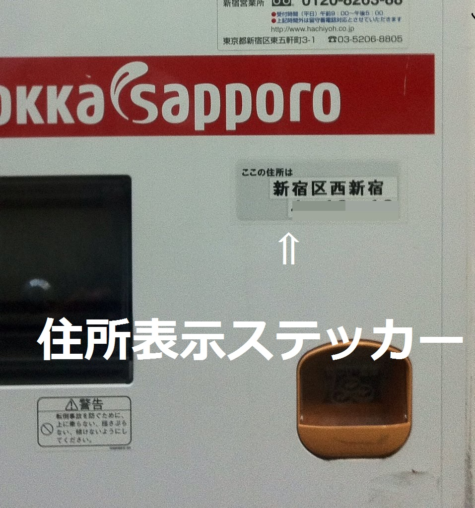 119番の項で、「住所表記ステッカー」を説明するために撮影した画像。自動販売機に取り付けられているものの一例。カメラで撮影。